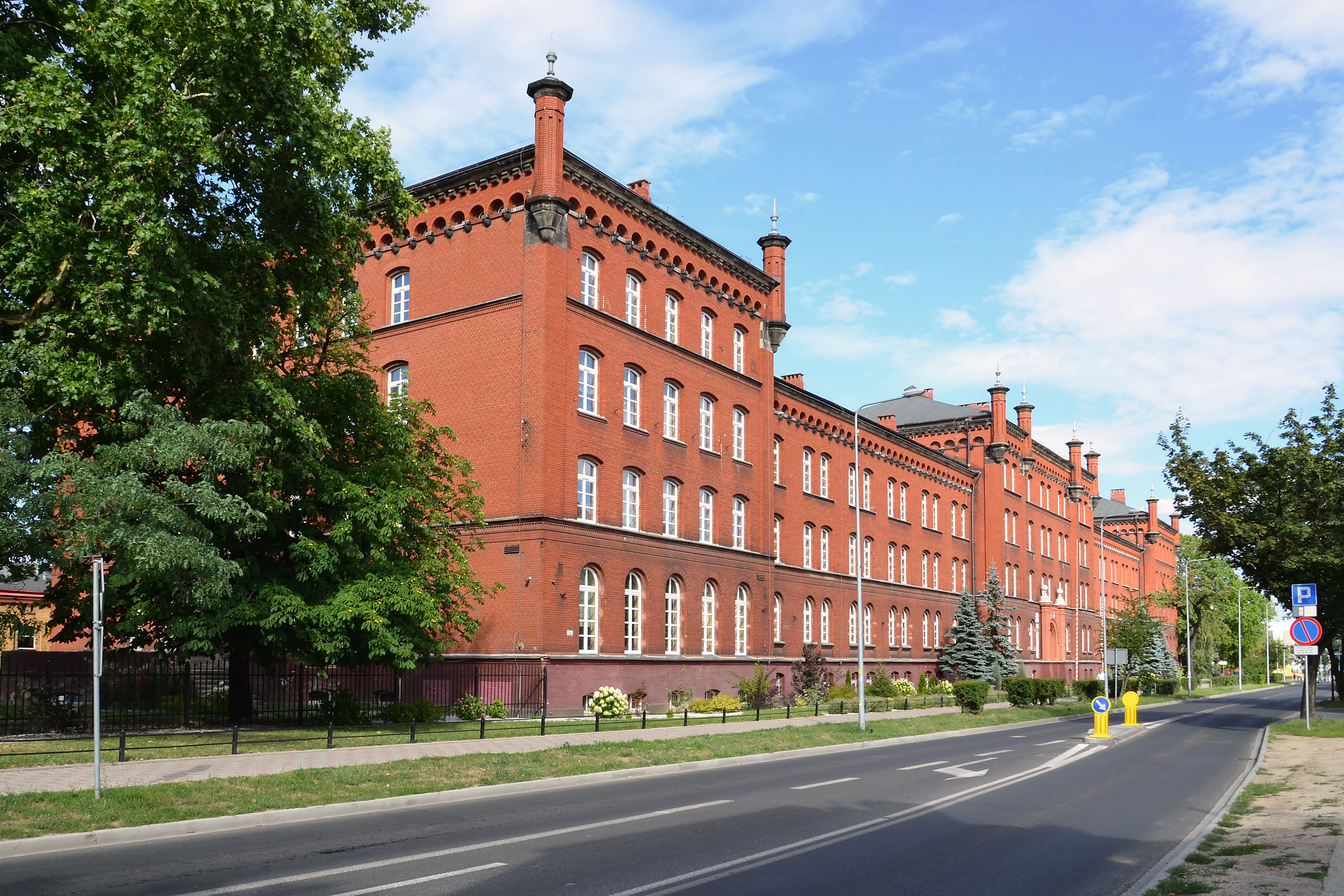 Zespół Szkół Nr 1 30.10.06.